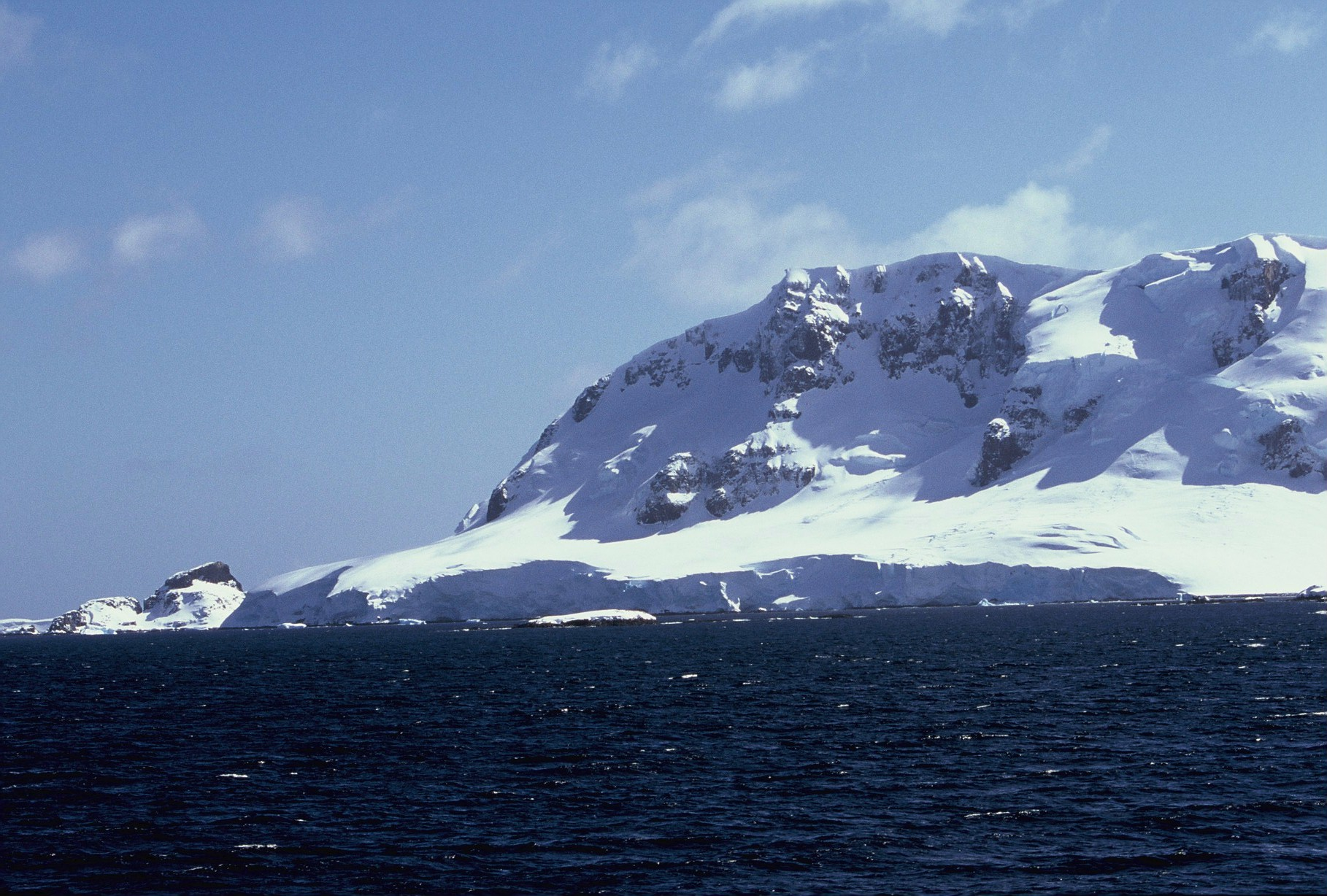 Cierva Cove (2)